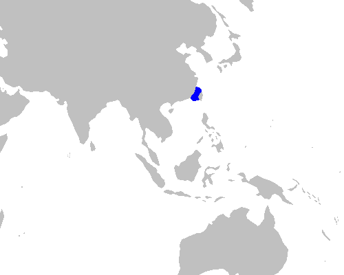 Distribution map for Squatina tergocellatoides